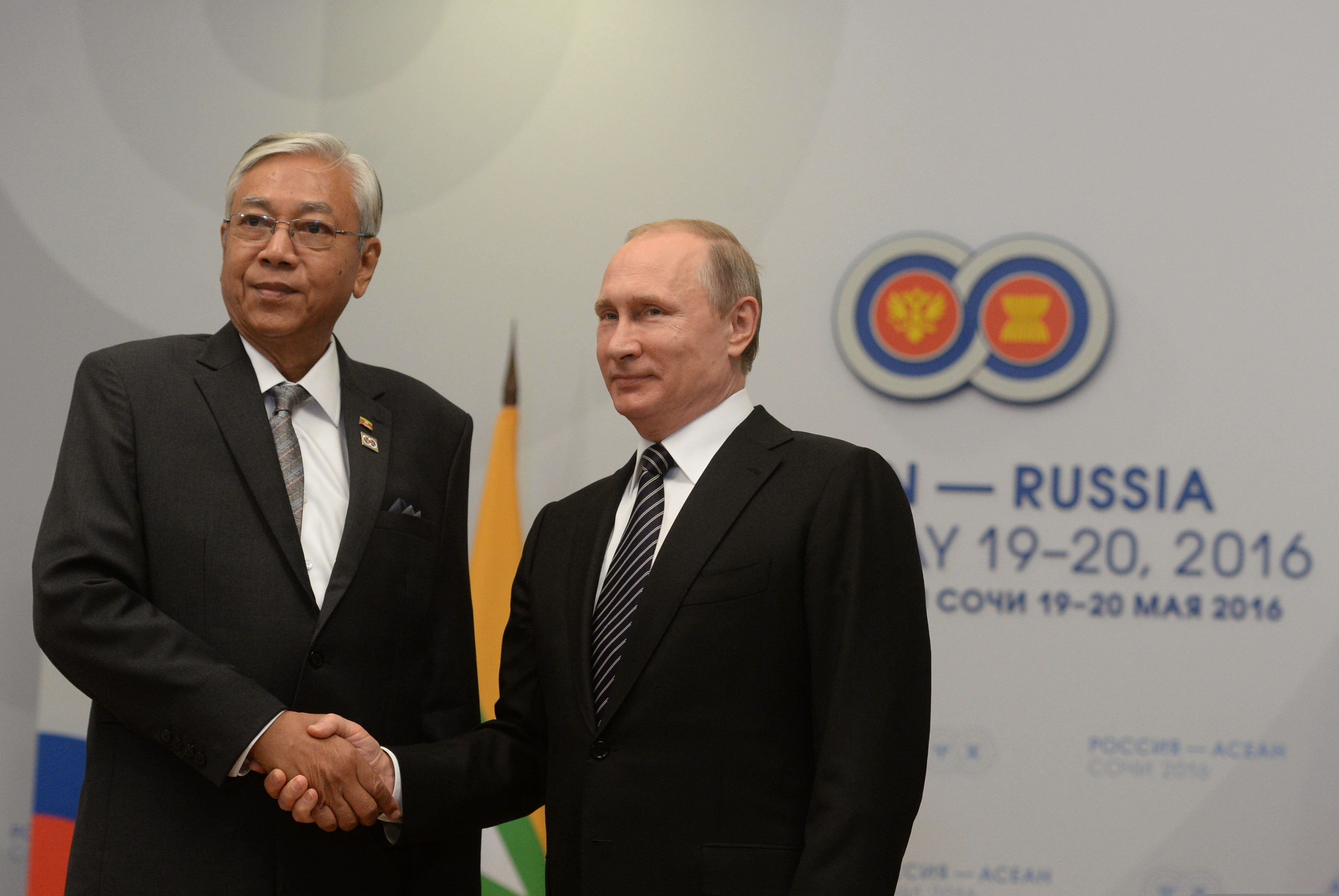 Президент Мьянмы Тхин Чжо и президент России Владимир Путин на саммите Россия-АСЕАН в Сочи 19.05.2016